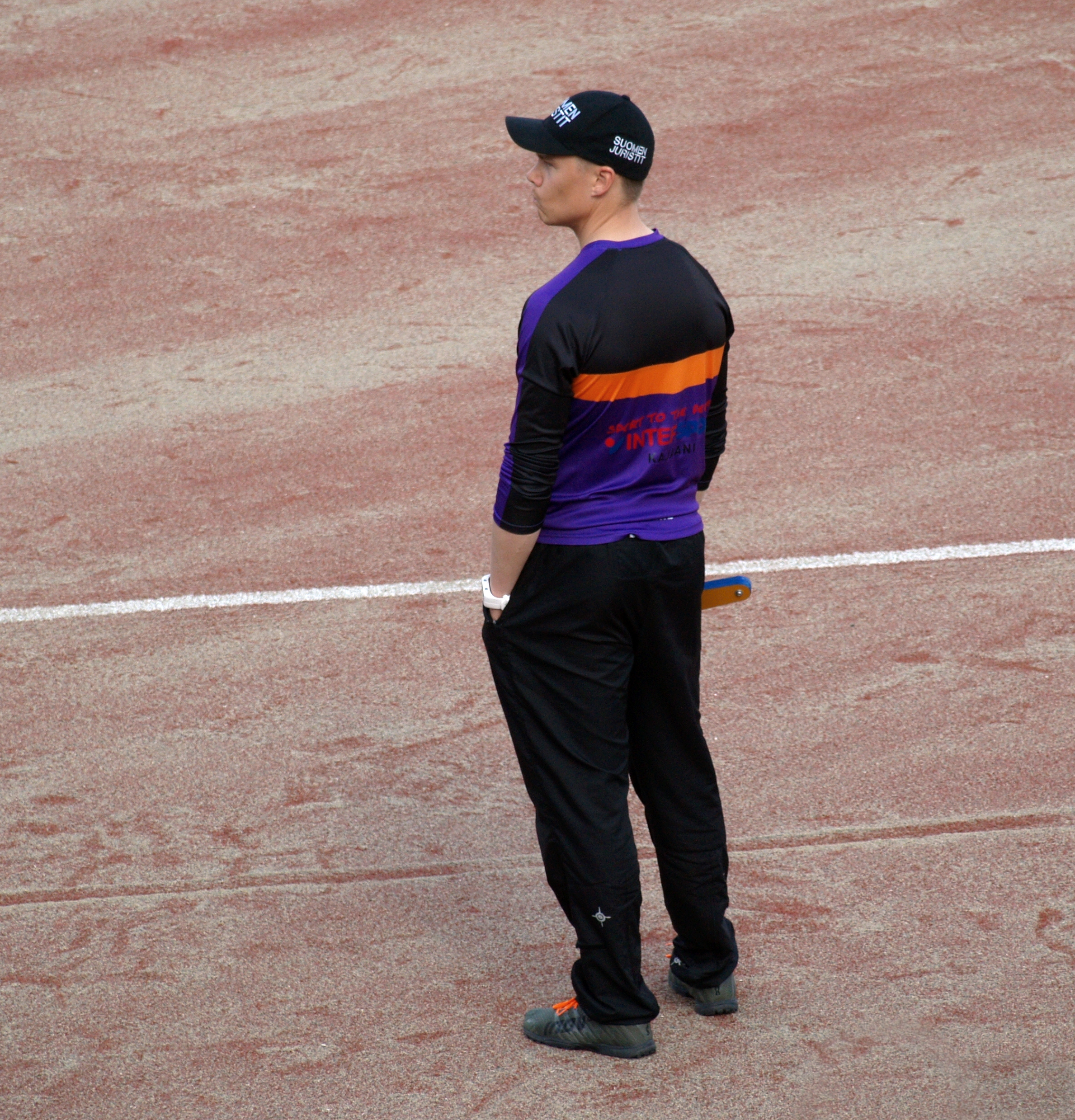 Mikko Korhonen ottelussa Vimpelin Veto - Sotkamon Jymy (19.7.2015).